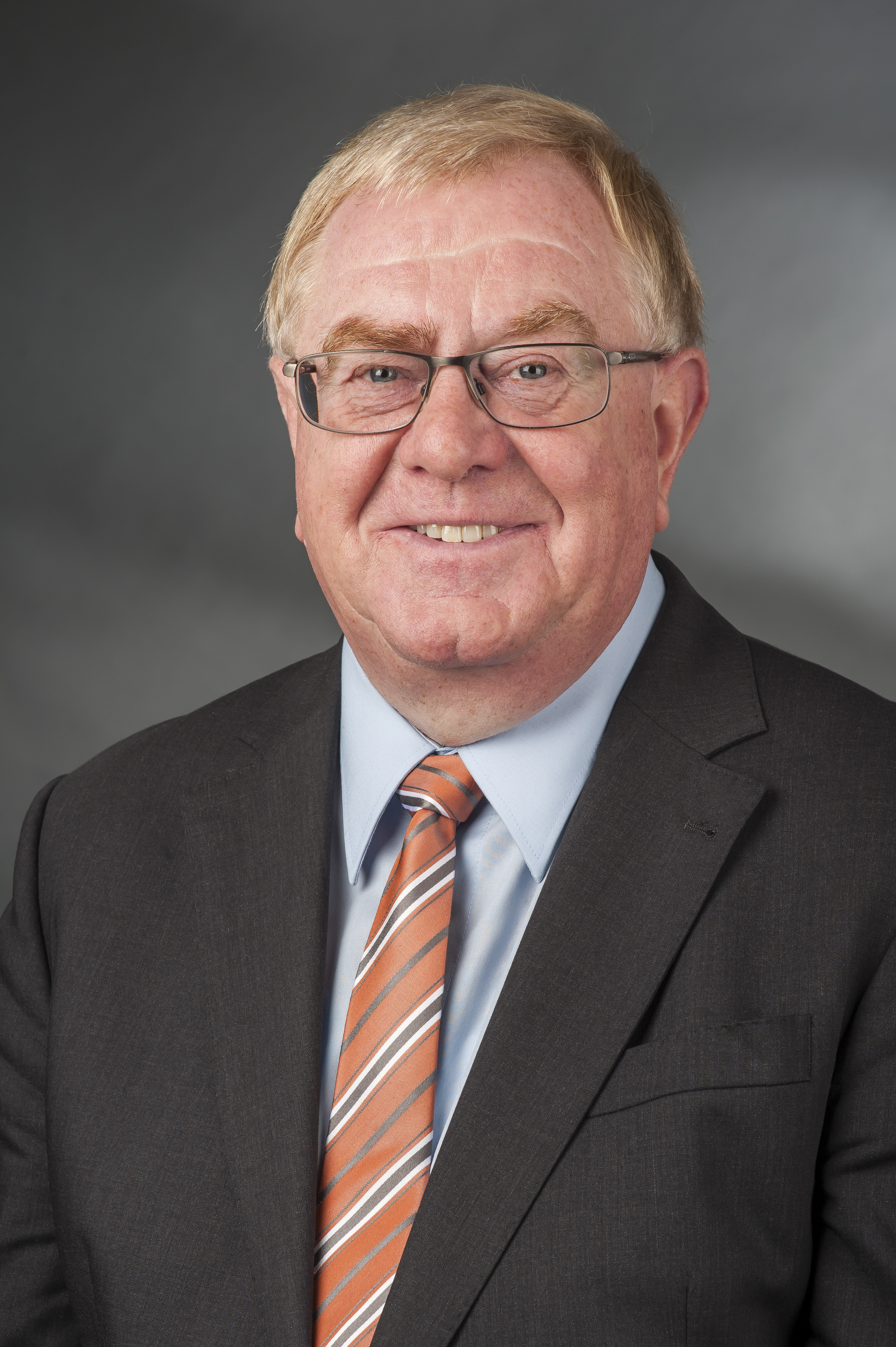 Reinhold Sendker (* 24. Oktober 1952 in Warendorf) ist ein deutscher Politiker (CDU). Er war von 2000 bis 2009 Abgeordneter im Landtag von Nordrhein-Westfalen und gehört seit 2009 dem Bundestag an.